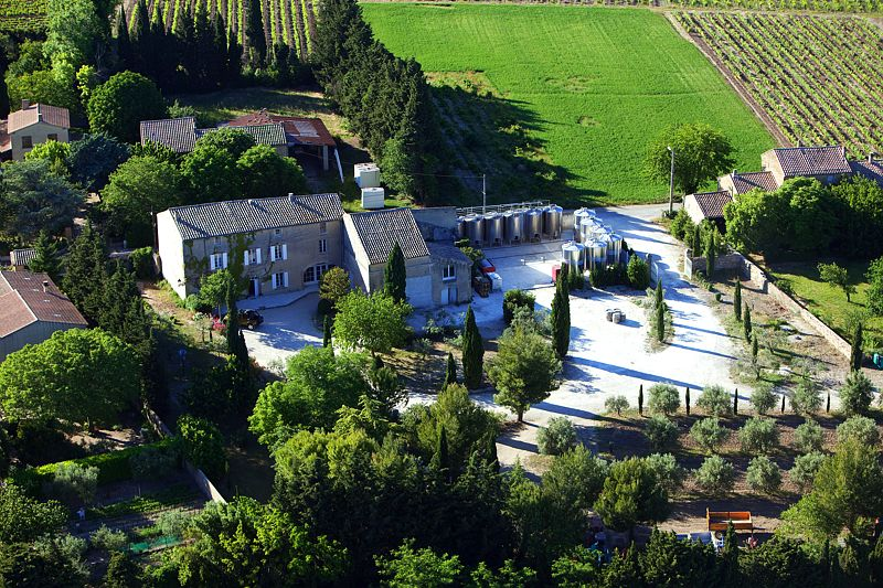 Camille Moirenc Photographe Photo du Domaine en 2011.